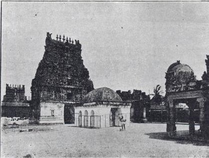 Kayarohanaswami Temple, Nagapattinam